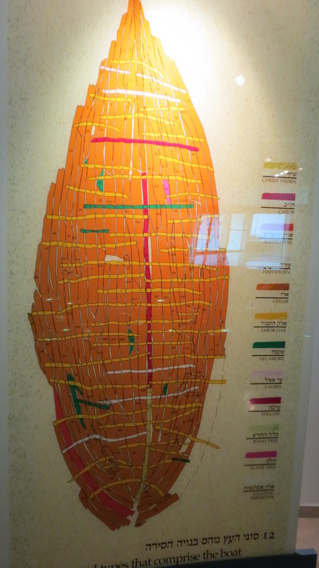 Yigal Allon Center - Yigal Alon Museum, Kibbutz Ginnosar, Sea of the Galilee, Israel בית יגאל אלון